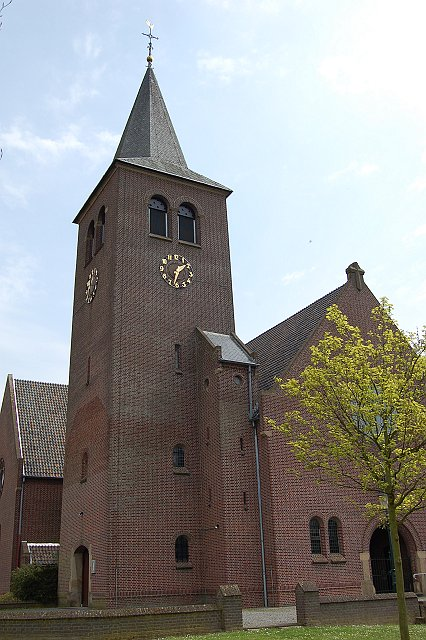 Foto is door de gebruiker zelf gemaakt.